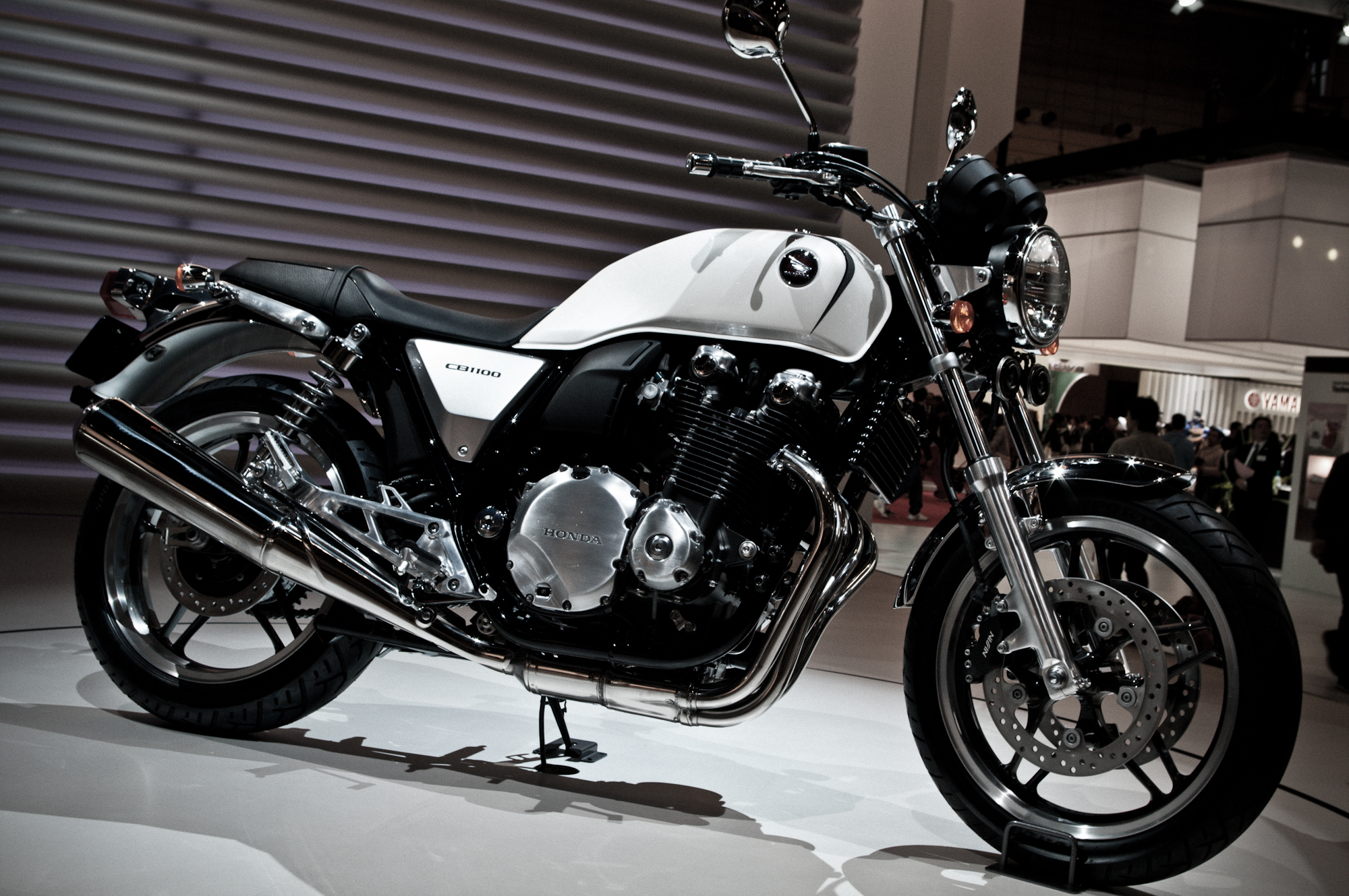 2009年東京モータショー。 K-7で撮影したデーターをLightroom3で再現像してみました。